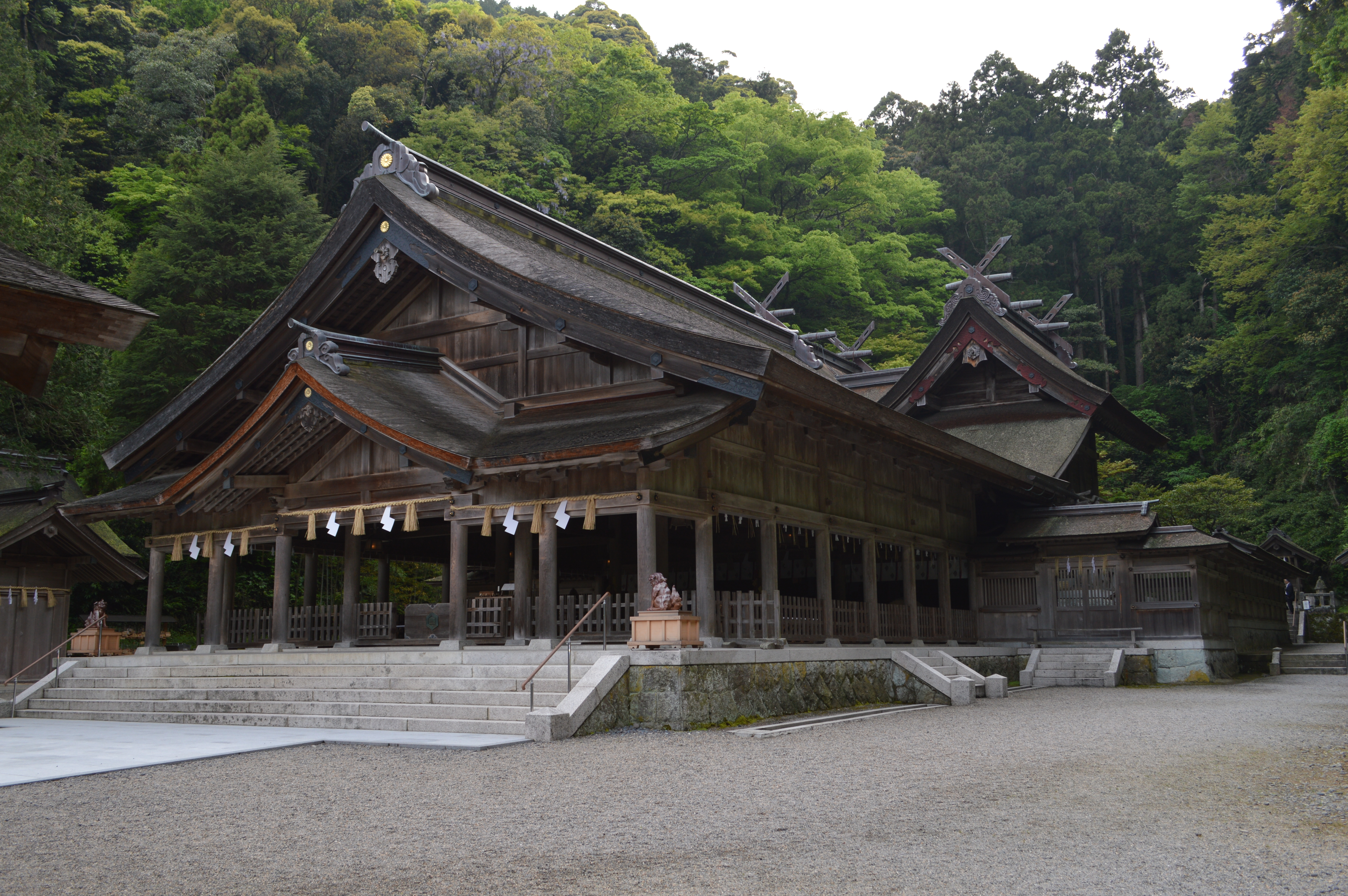 美保神社社殿